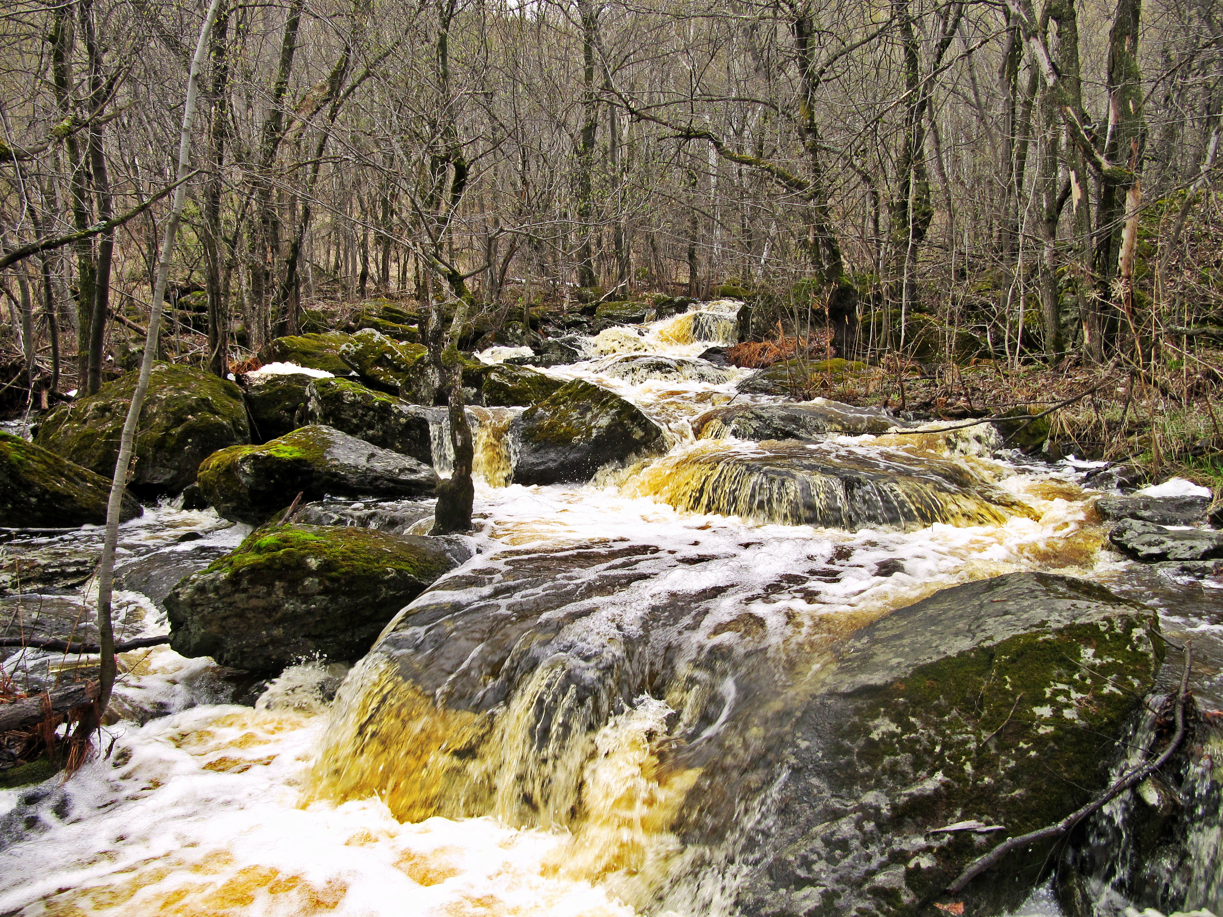 Ибрагимовский водопад (Гадельша), Баймакский район This image is related to the protected area of Russia number 0210033